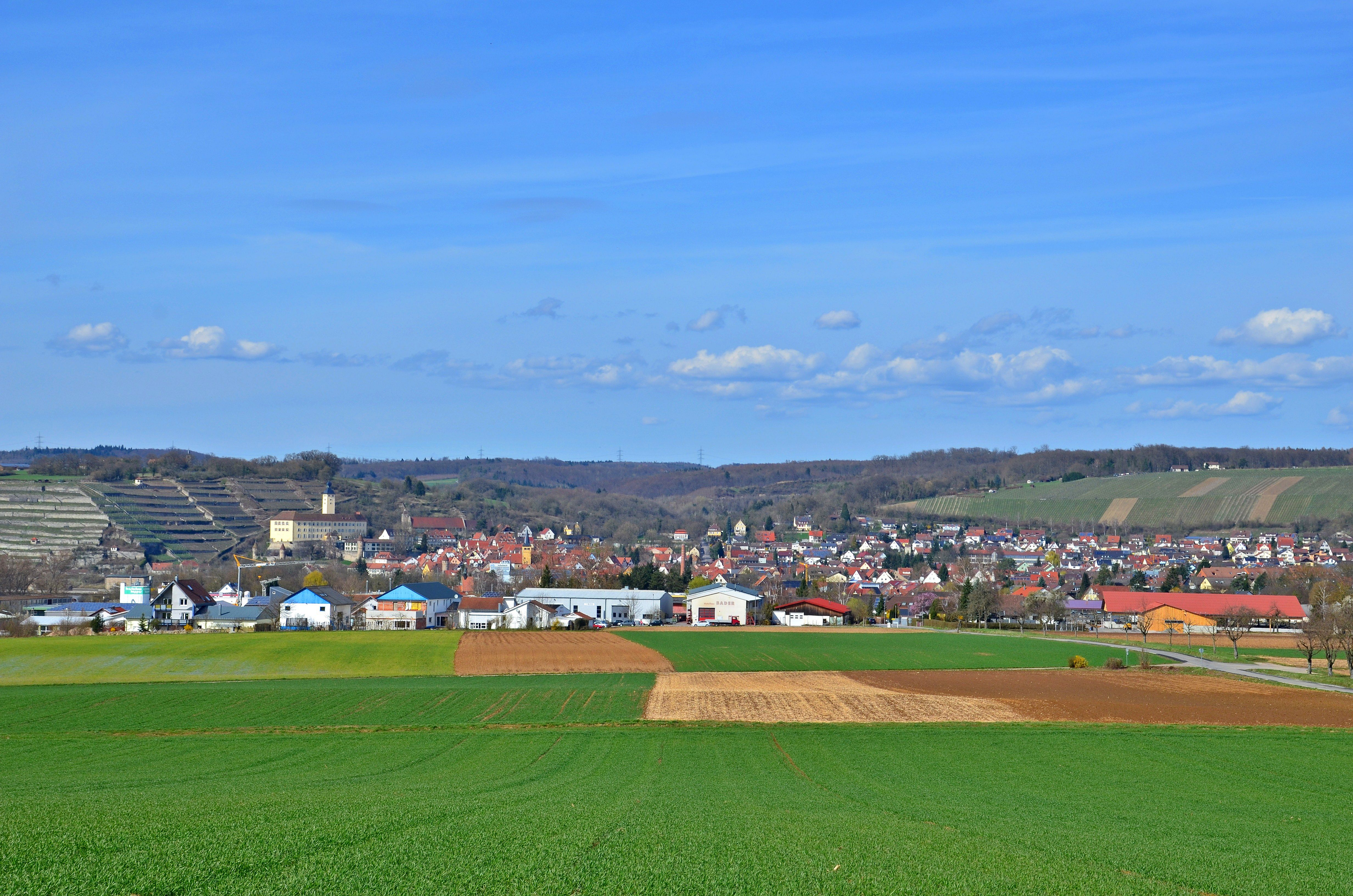 Blick auf Gundelsheim